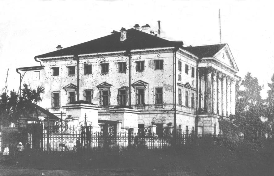 г. Иркутск. Белый дом. На фото – дом после осады 8-16 декабря 1917.